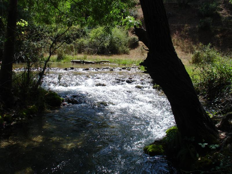 río Aguamulas